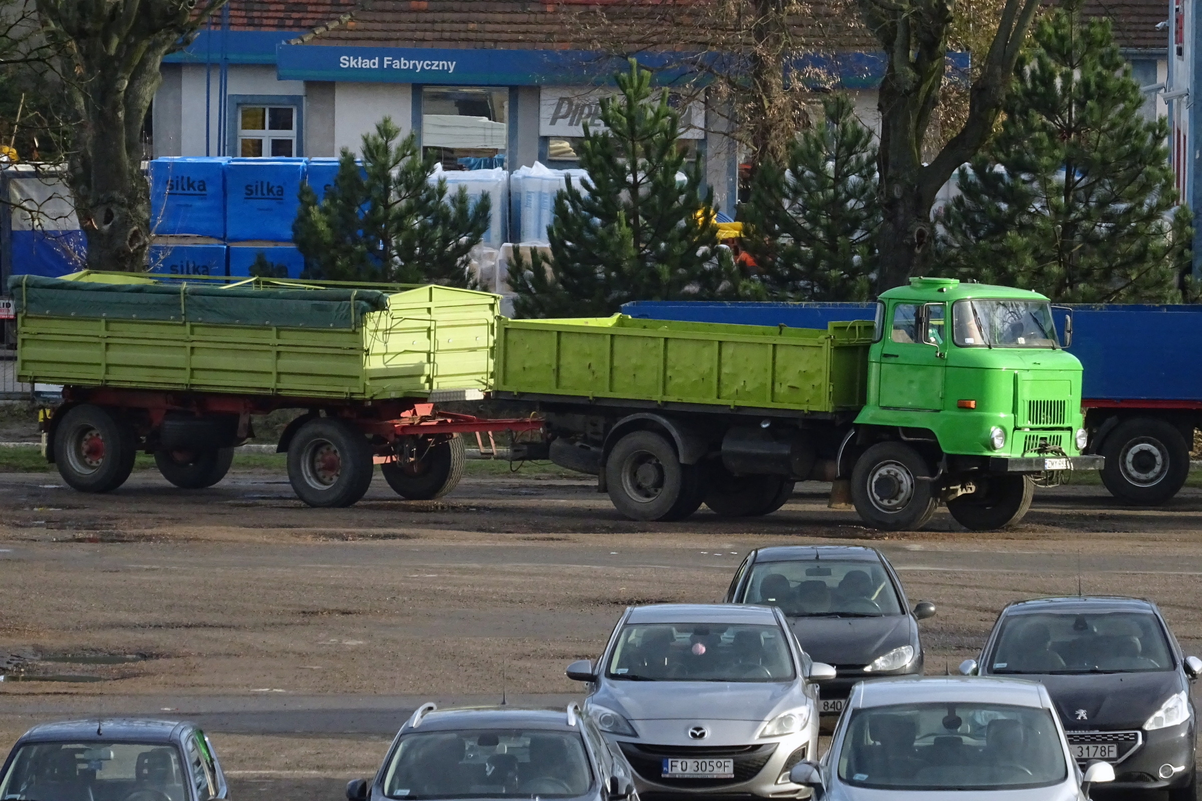 IFA L60, samochód ciężarowy, który produkowany był przez VEB IFA w Ludwigsfelde w NRD w latach 1965–1990. Na zdjęciu, z przyczepą HL HW 8011